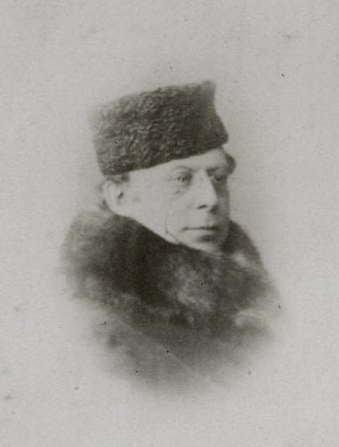 Помпей Николаевич Батюшков (1811—1892)